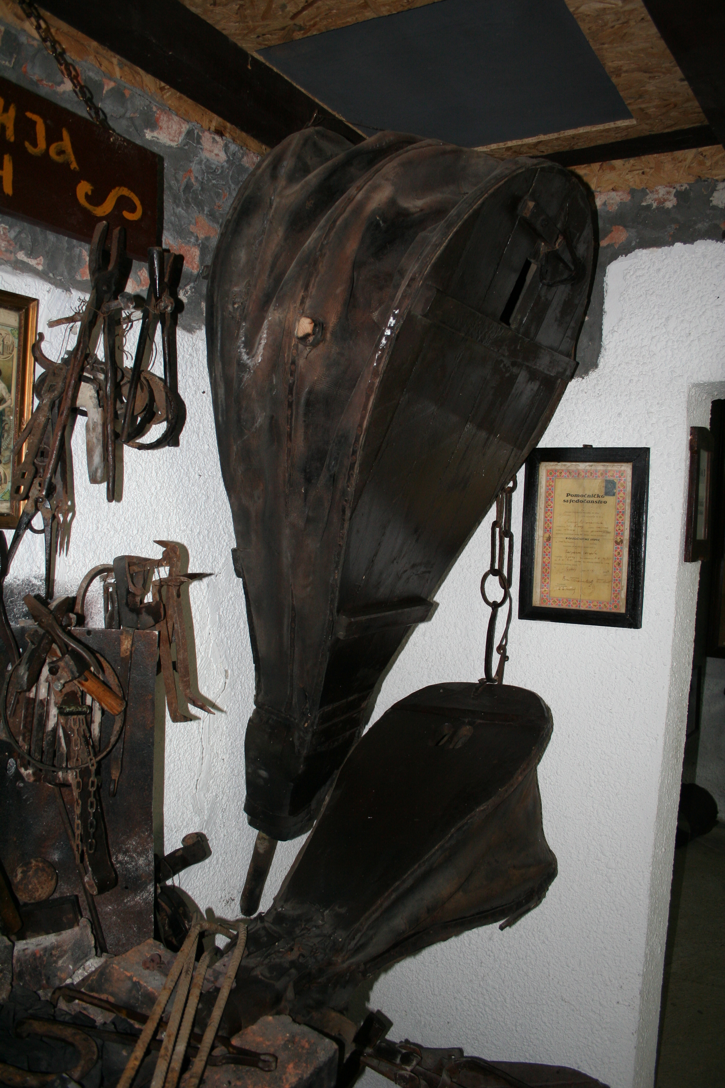 Muzej zanata Dobri potok